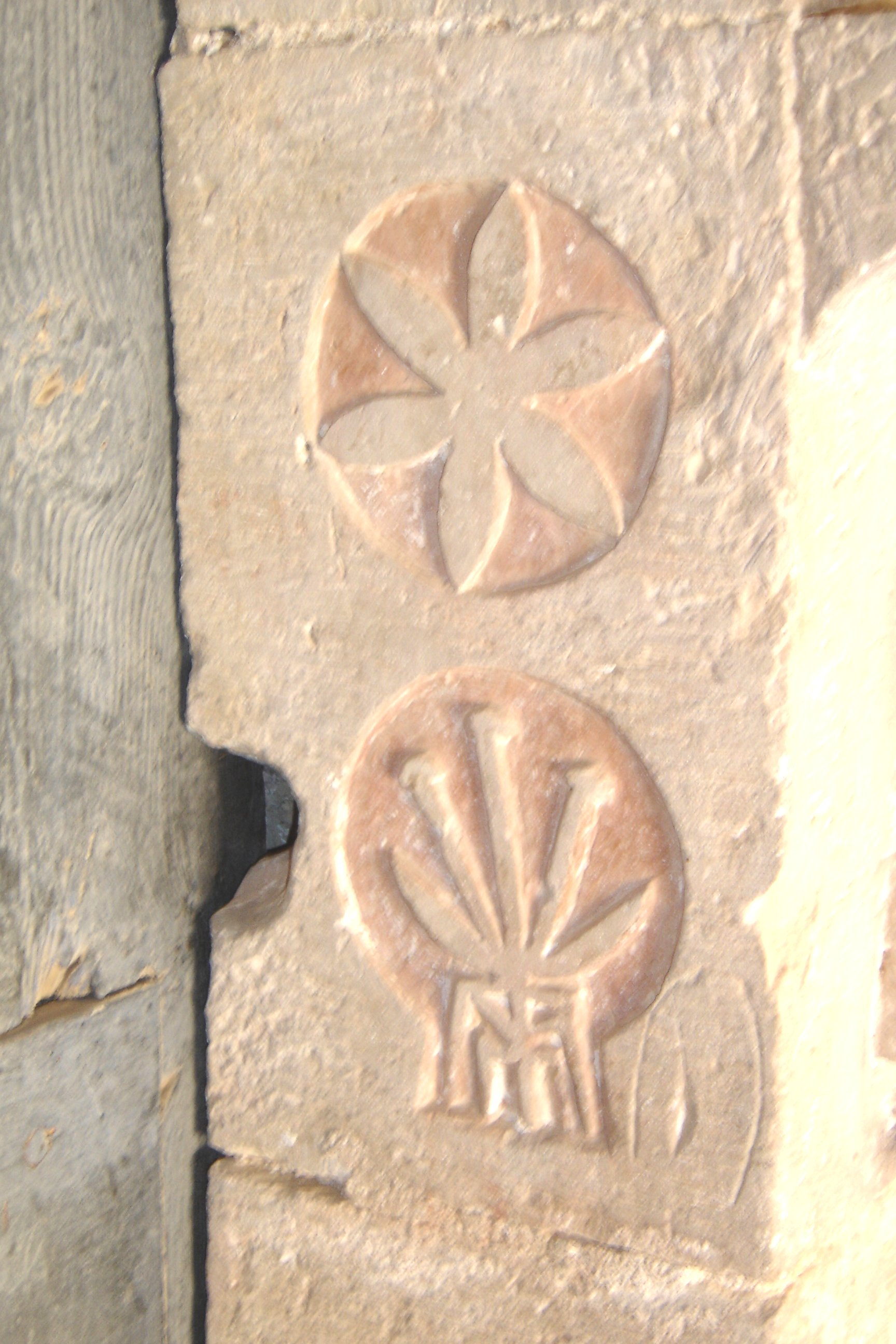 L'ermita de Sant Lleïr de Casabella, al municipi de La Coma i la Pedra, a la Vall de Lord (Solsonès). Els motius escolpits a l'intradós del carreu de la dreta de la portalada